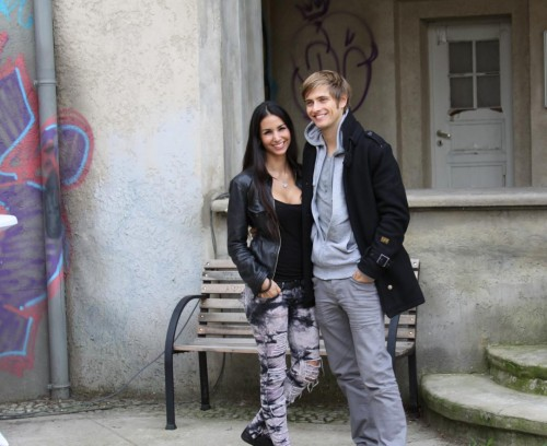 Sila Sahin und Jörn Schlönvoigt am 6.10.2010 bei der Vorstellung des neuen GZSZ-Außensets in Babelsberg